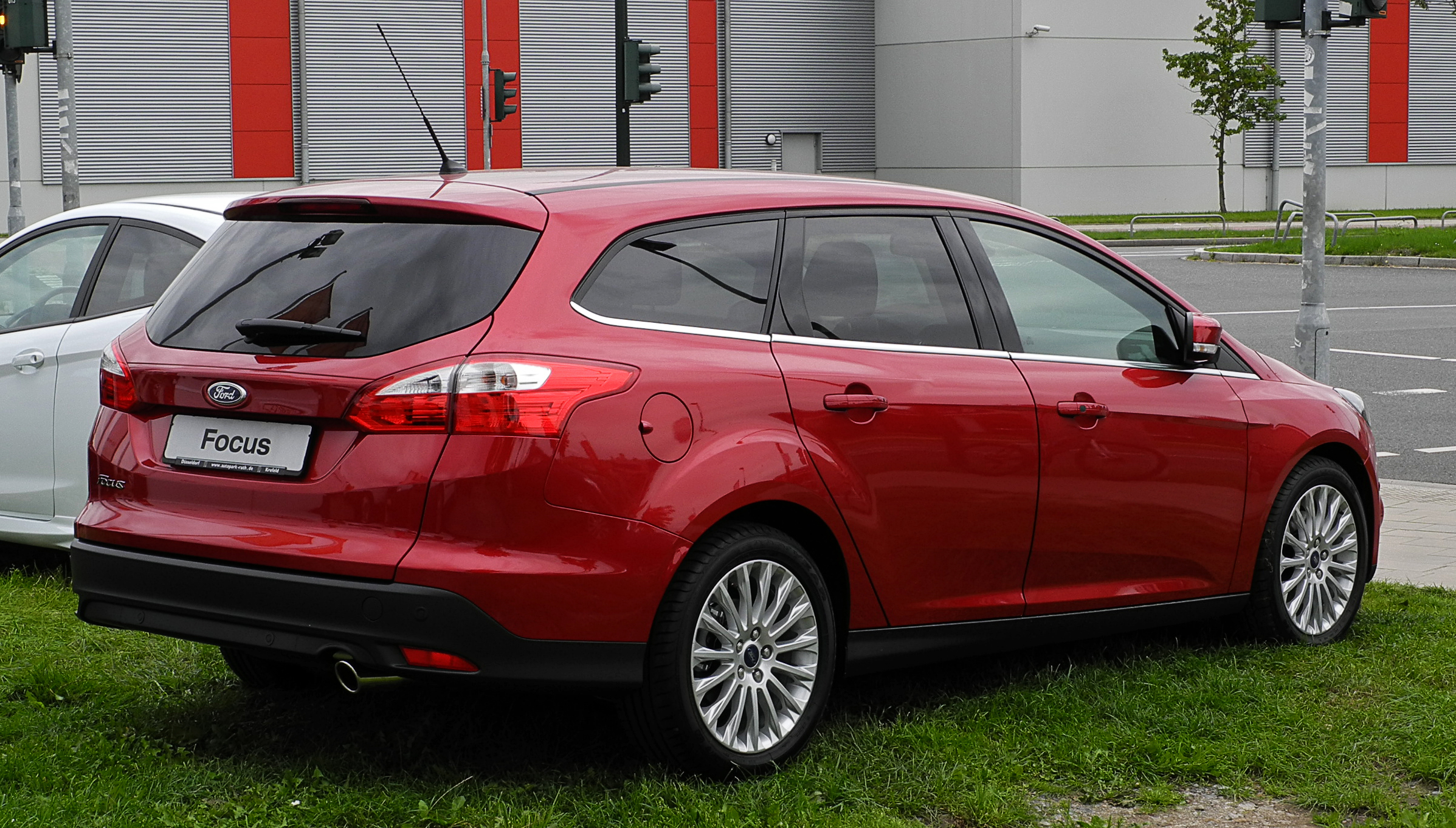 Ford Focus Turnier Titanium (III)